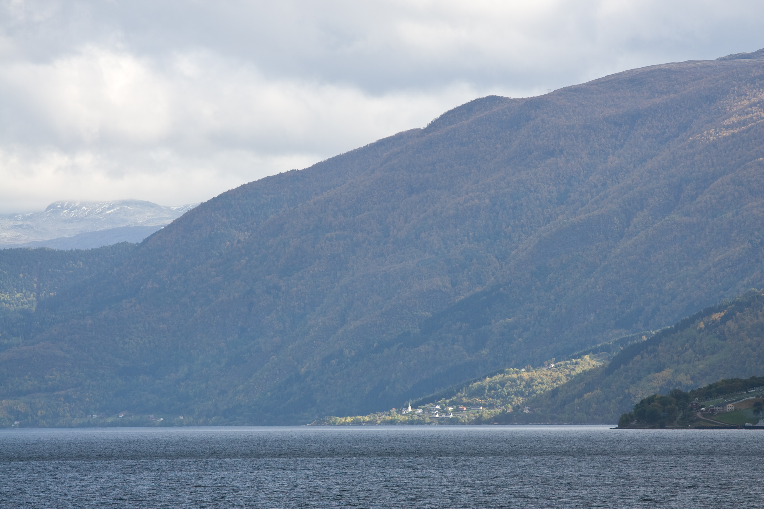 Feios sett frå Holmen i Balestrand, lengst til høgre ytste snutten av Vangsnes